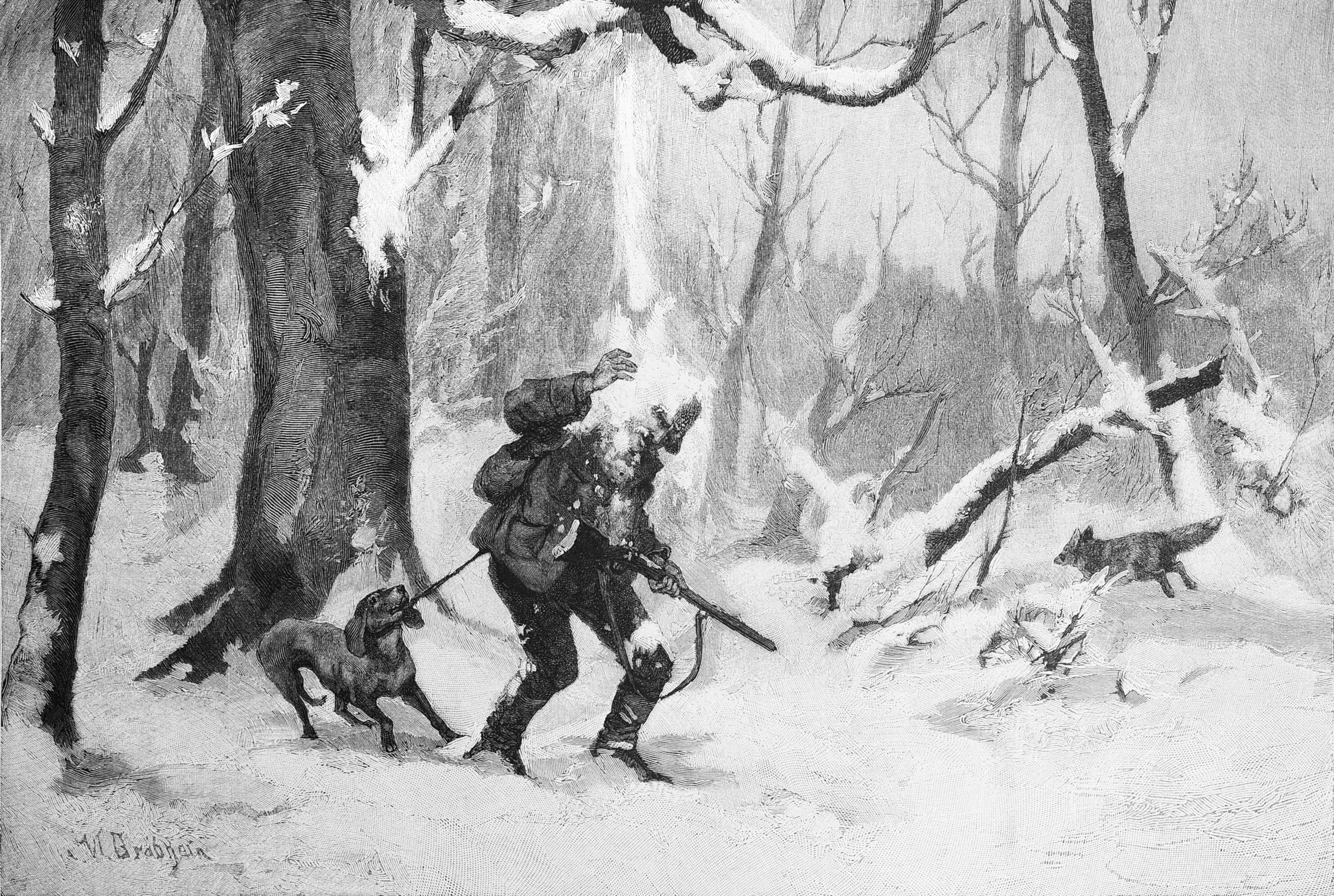 Jägerpech